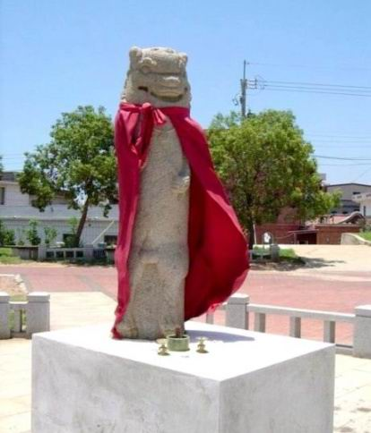 金湖鎮瓊林風獅爺 位環島北旁，保存完整，未加彩繪 材料：石造 朝向：北 姿勢：直立 高度：189公分 面寬：40公分 原圖為趙鈞志BLACKJOKER於2004年7月前往金門旅遊時所攝(Sony P10)，經攝影者同意發表於維基百科中文版風獅爺相關條目使用。